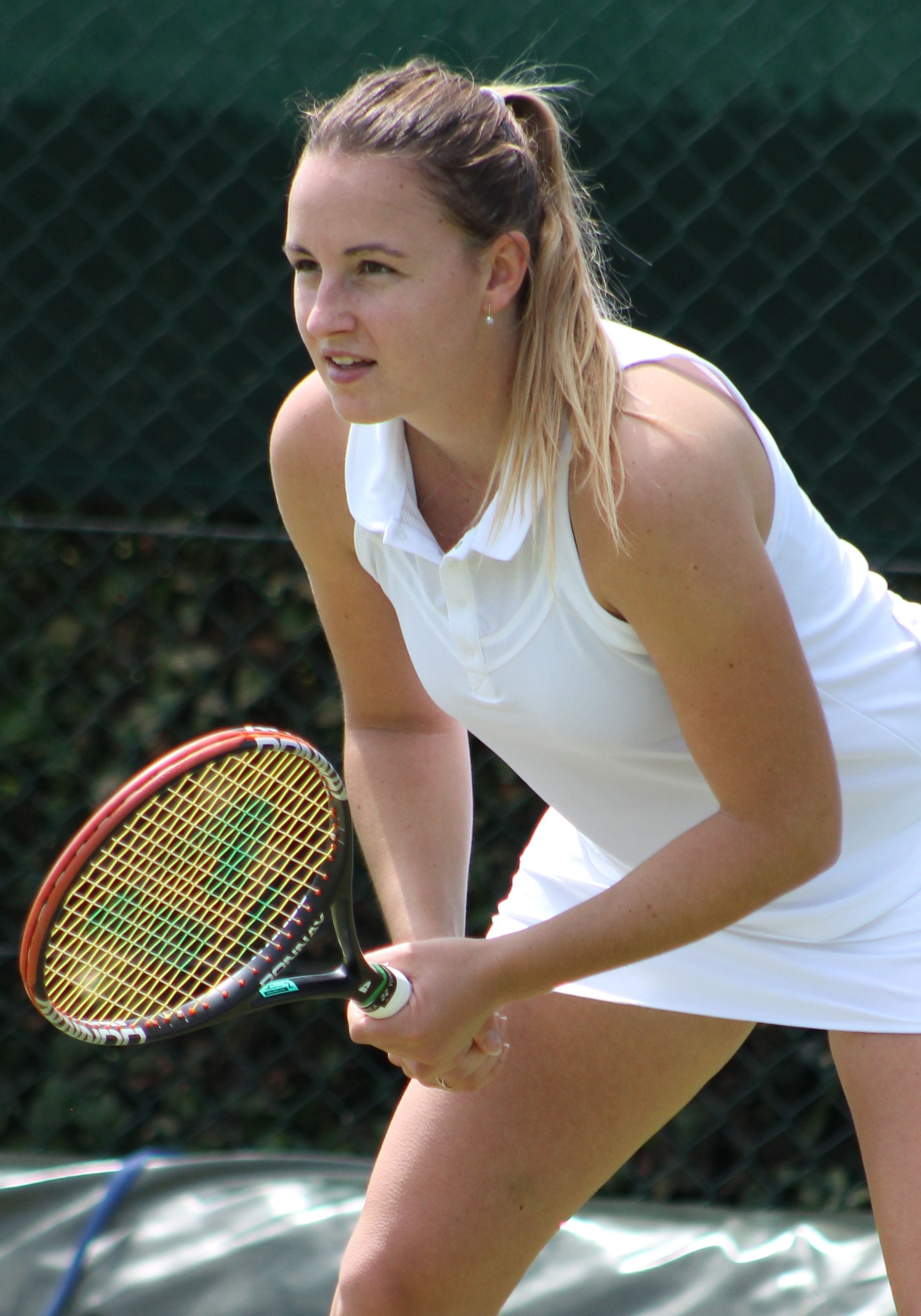 Pavlovic WMQ14